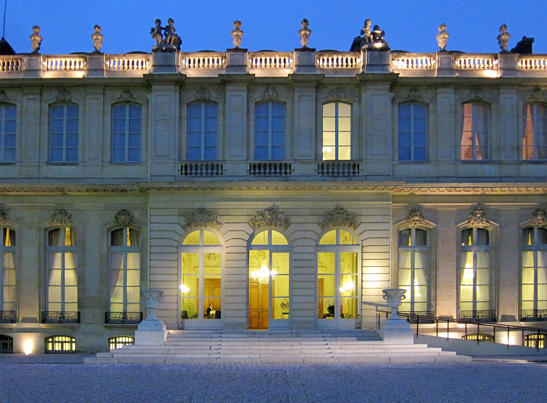 L'entrée de l'hôtel de Lassay à Paris (France).